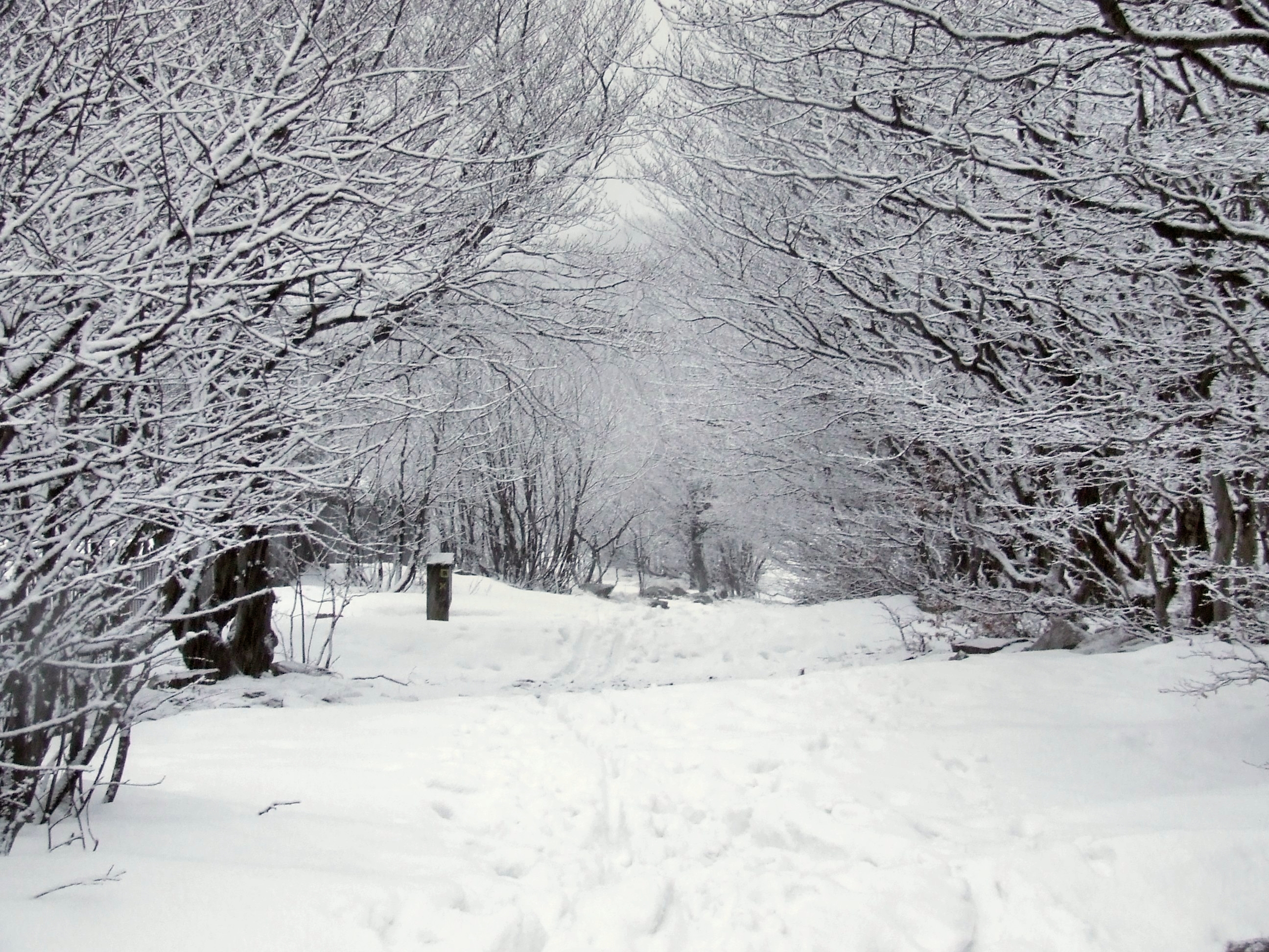 Monte Beigua - neve sulla via della preghiera